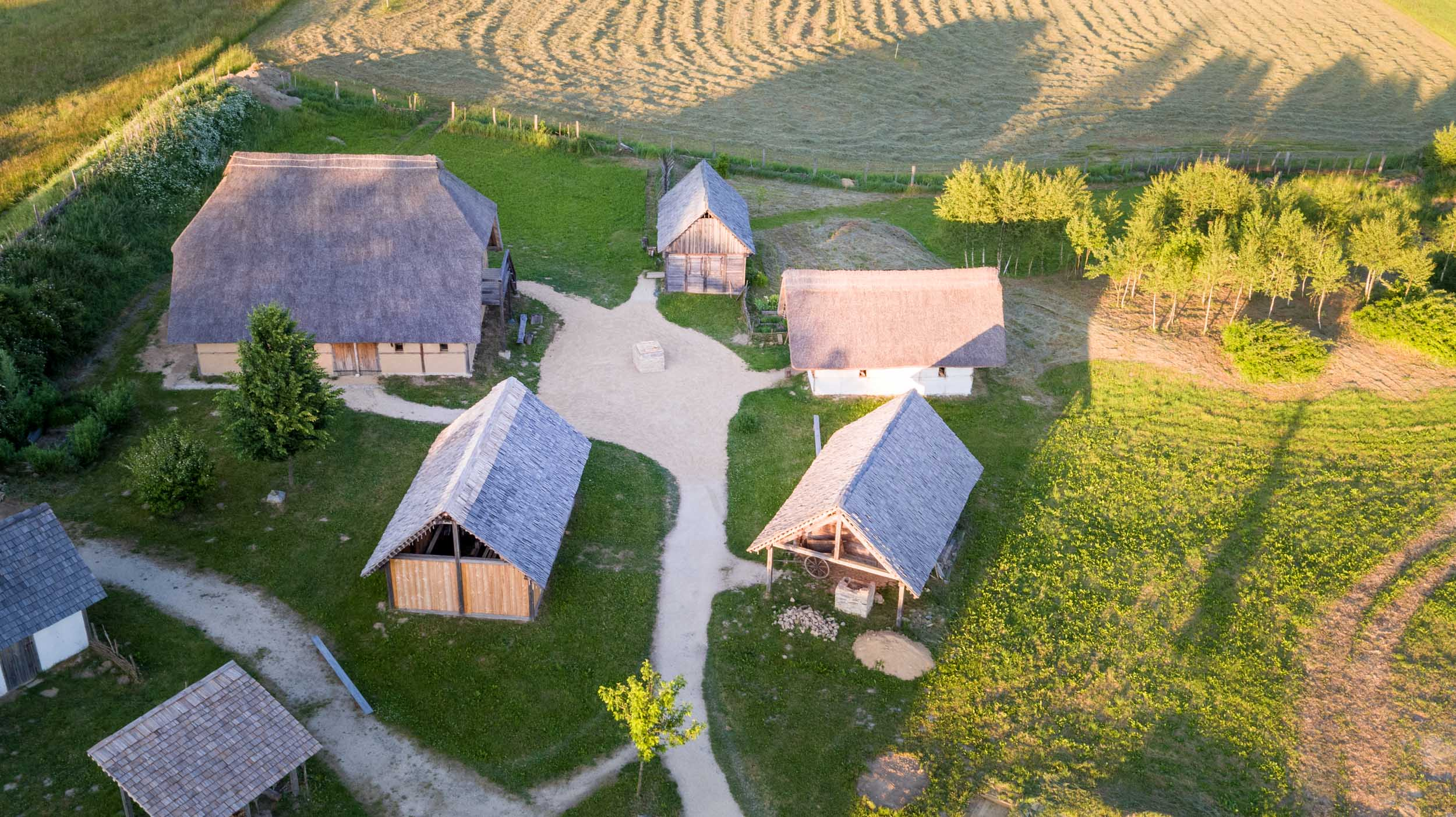 Geschichtspark-Baernau-Hochmittelalter